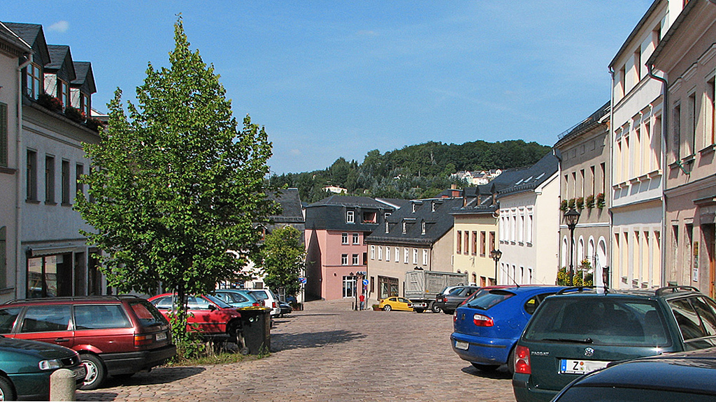 Beschreibung: Neuer Markt - new market / Kirchberg in Sachsen (Saxony, Germany) - Teil des Denkmalschutzgebiets Altstadt Kirchberg. Fotograf: Darkone, 28. August 2005